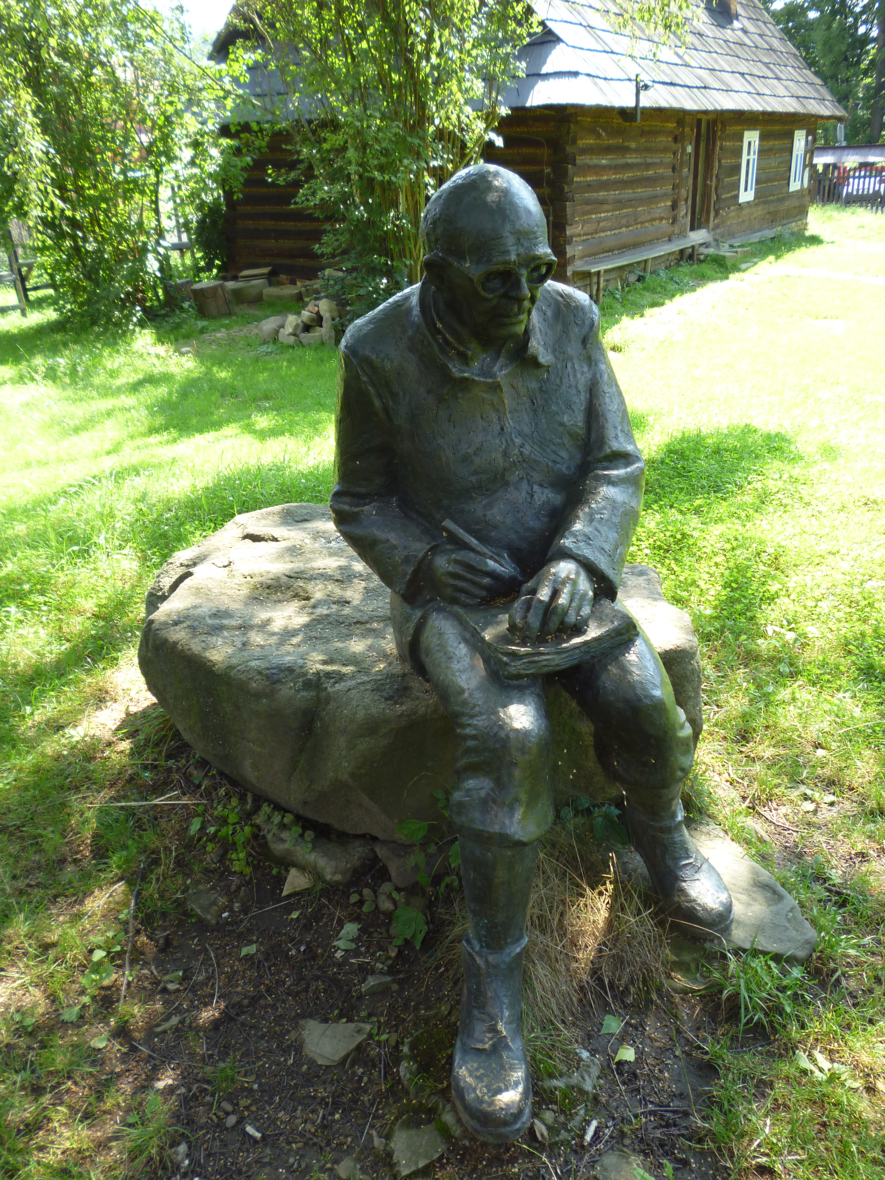 Pomnik prof. Reinfussa w Skansenie Wsi Pogórzańskiej w Szymbarku, pomnik autorstwa rzeźbiarza Zdzisława Tohla